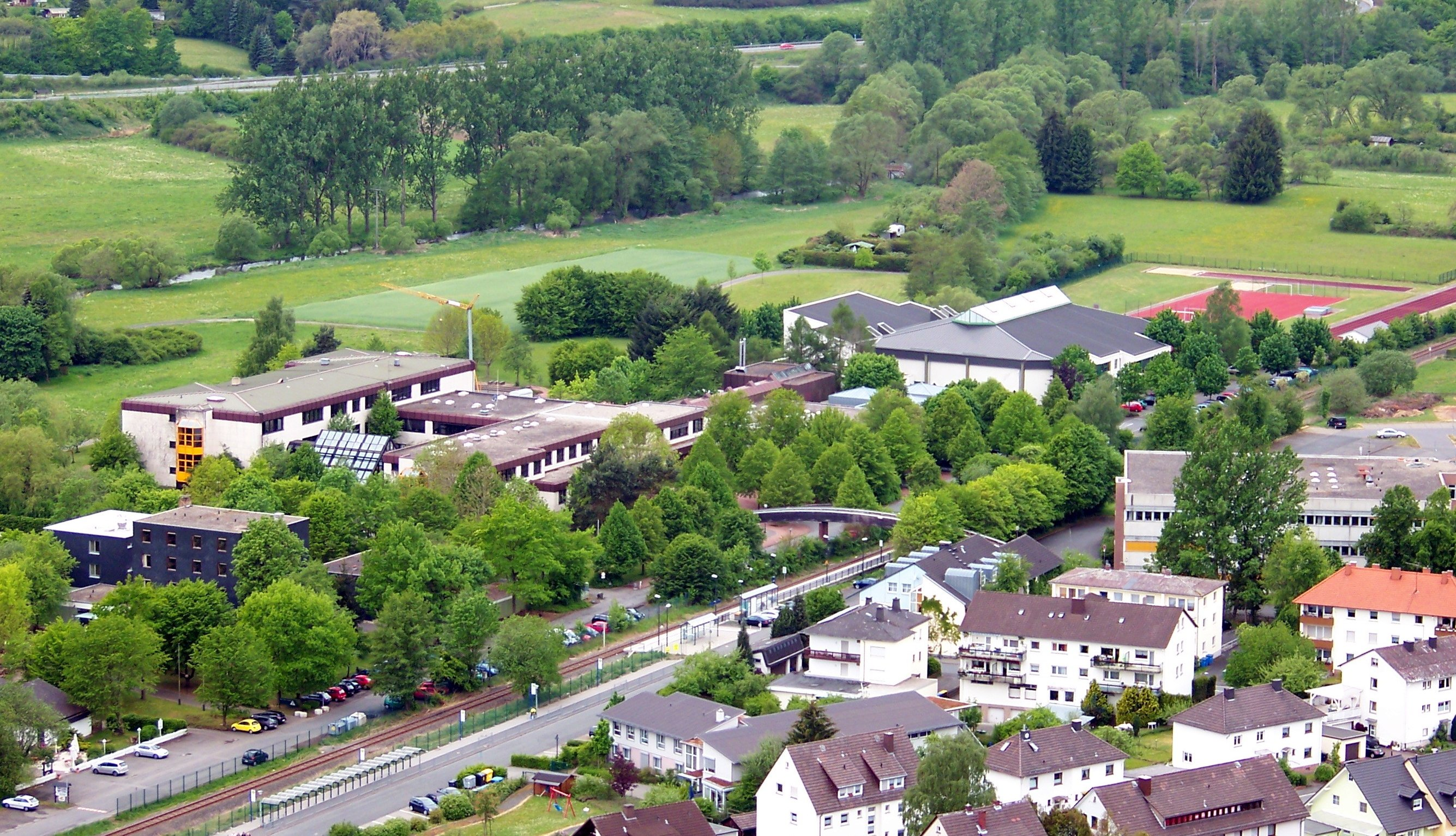 Lahntalschule Biedenkopf (Gymnasium) mit Lahntalhalle und Sportfeld sowie Jugendherberge und Haltestelle Biedenkopf-Schulzentrum